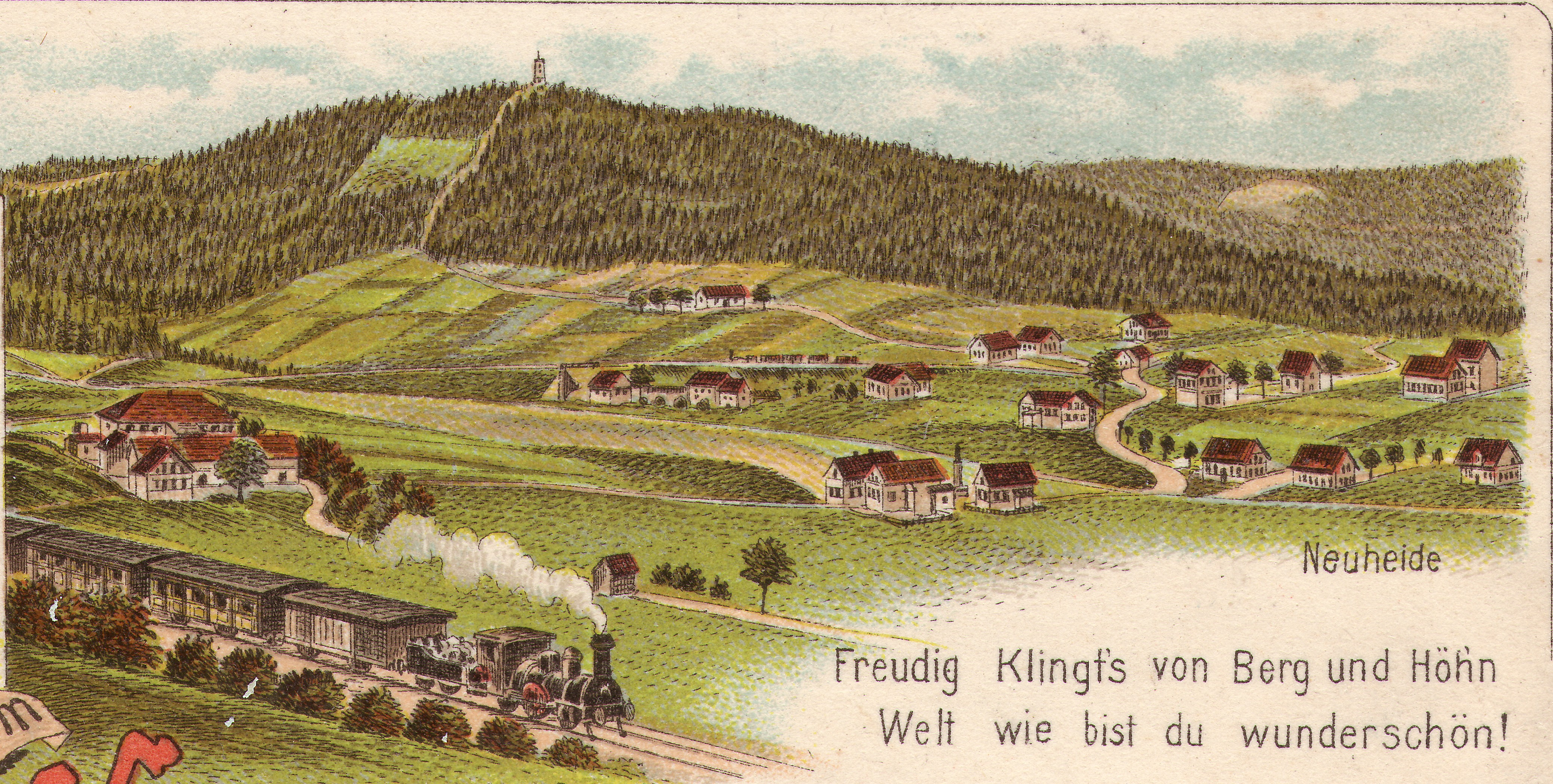 Neuheide (Schönheide): Ausschnitt aus einer Ansichtskarte "GRUSS vom KUHBERG b. Schönheide im Erzgeb.", nach dem Poststempel abgesandt in Schönheide am 27. September 1898. Im Vordergrund die Schmalspurbahn Wilkau-Haßlau–Carlsfeld, deren Betrieb in den 1960er Jahren nach und nach eingestellt wurde und die seit den 1990er Jahren als Museumsbahn verkehrt zwischen Schönheide, Neuheide und Stützengrün.